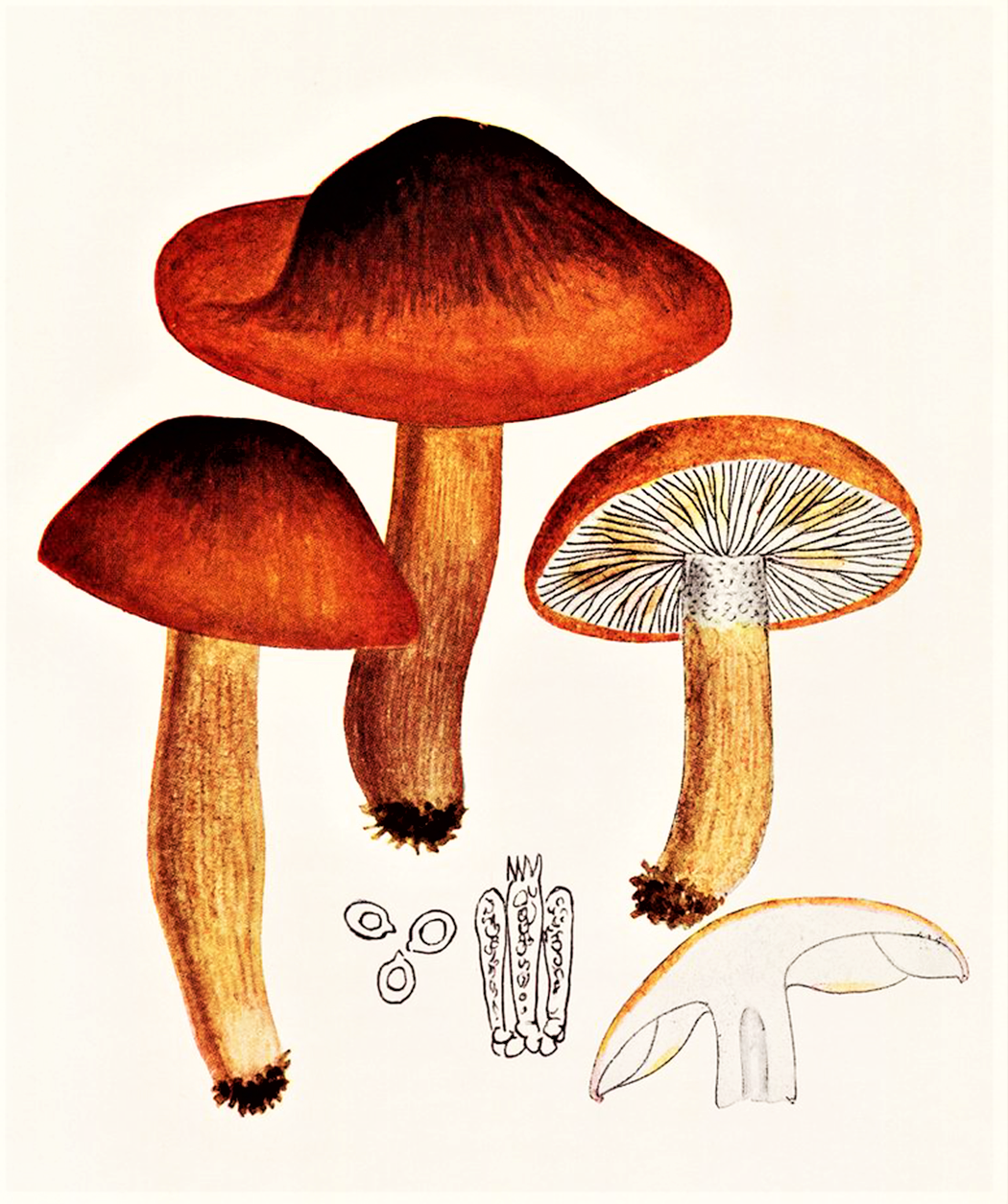 Giacomo Bresadola: Tricholoma fulvum (Bull., 1792, auch DC., 1805 oder Fr., 1818) Bigeard & H.Guill. (1909)